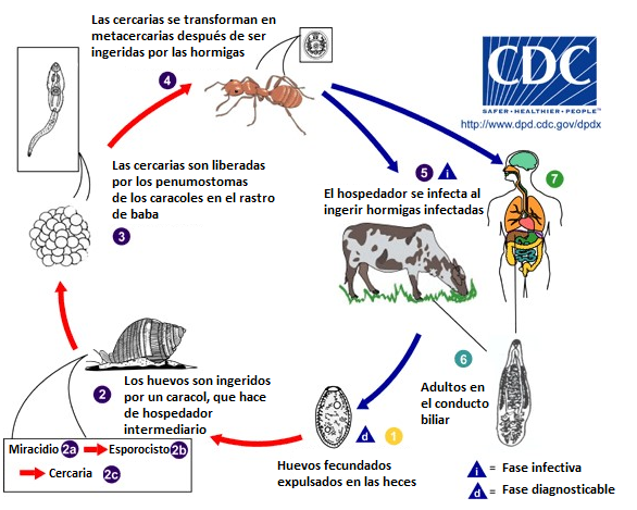 Ciclo de vida de Dicrocoelium dendriticum traducido al español desde la CDC